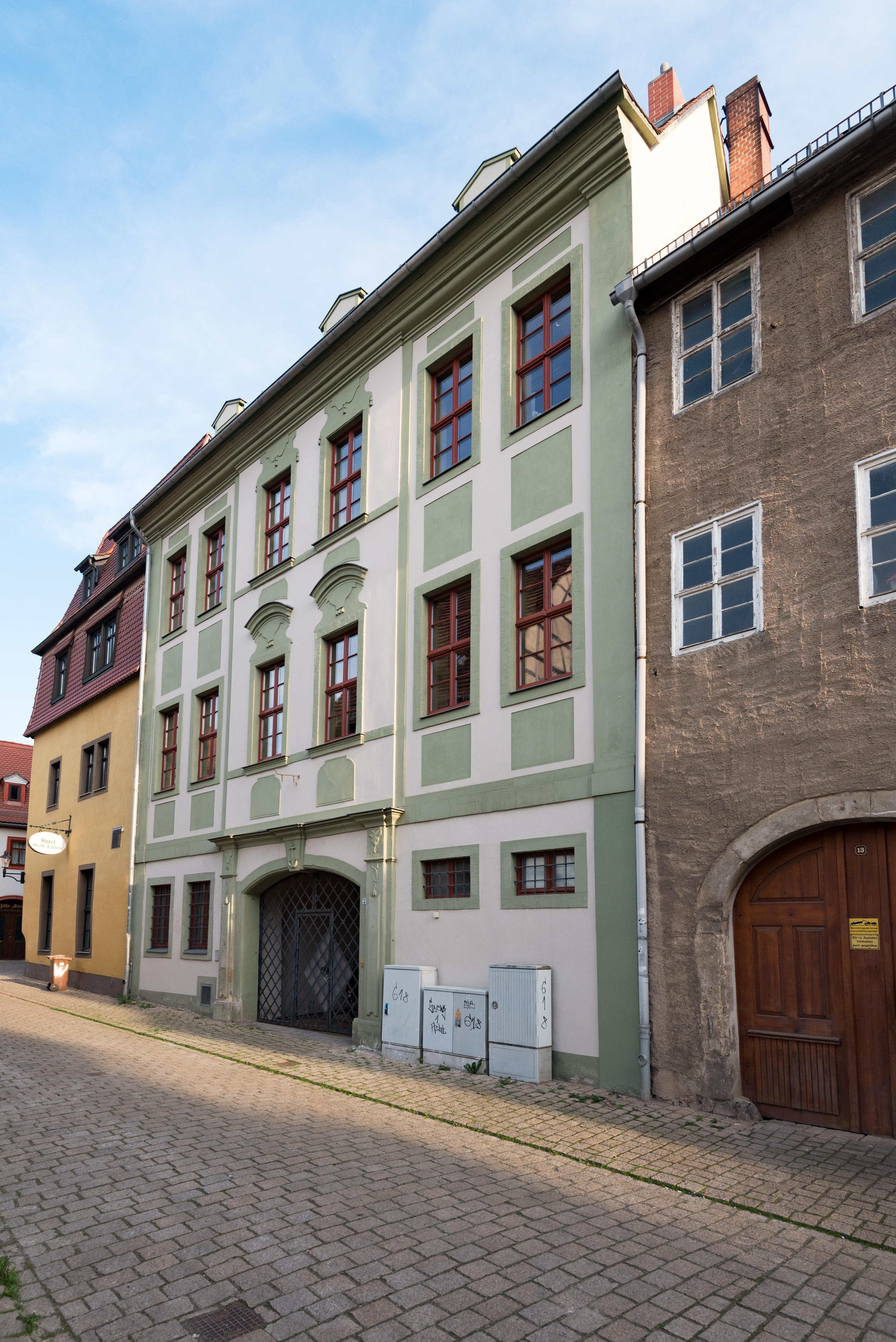 Naumburg (Saale), Mariengasse 14